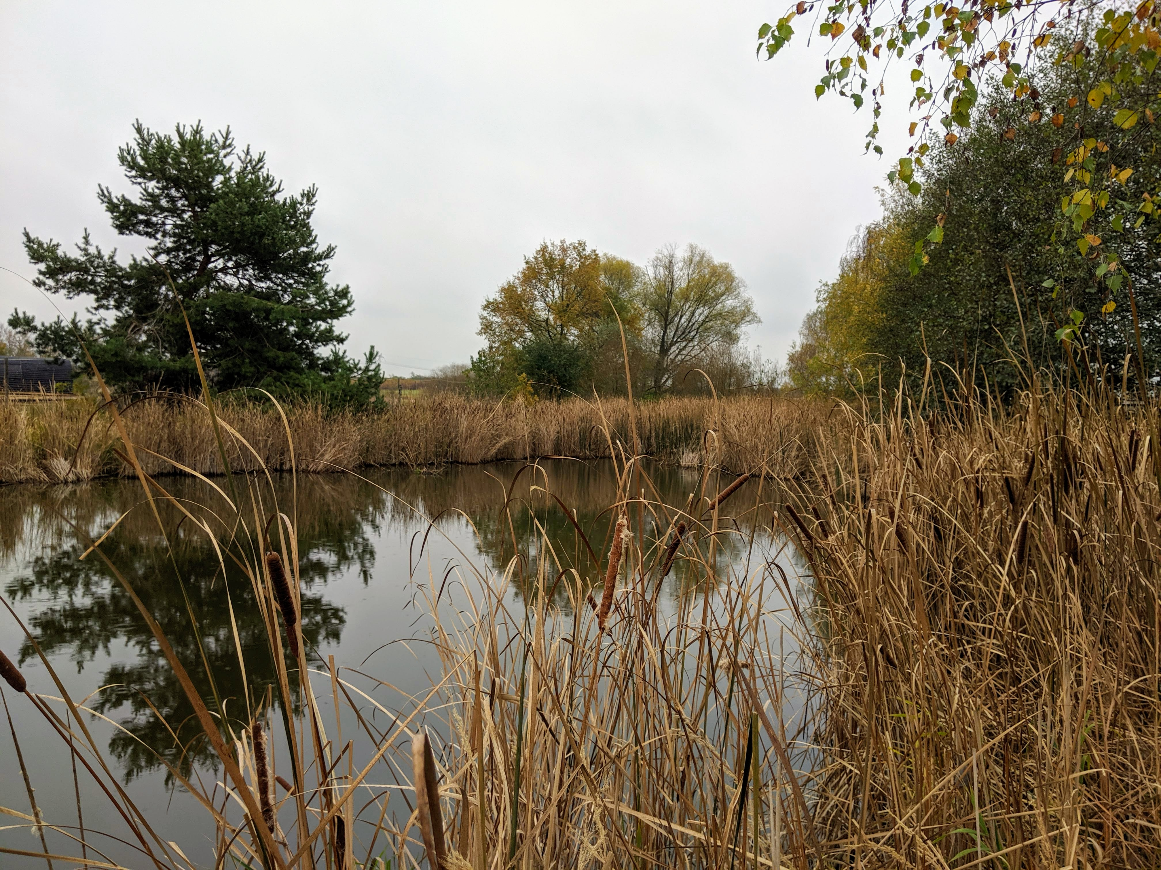 Brůdek - pohled na rybník a okolní vegetaci